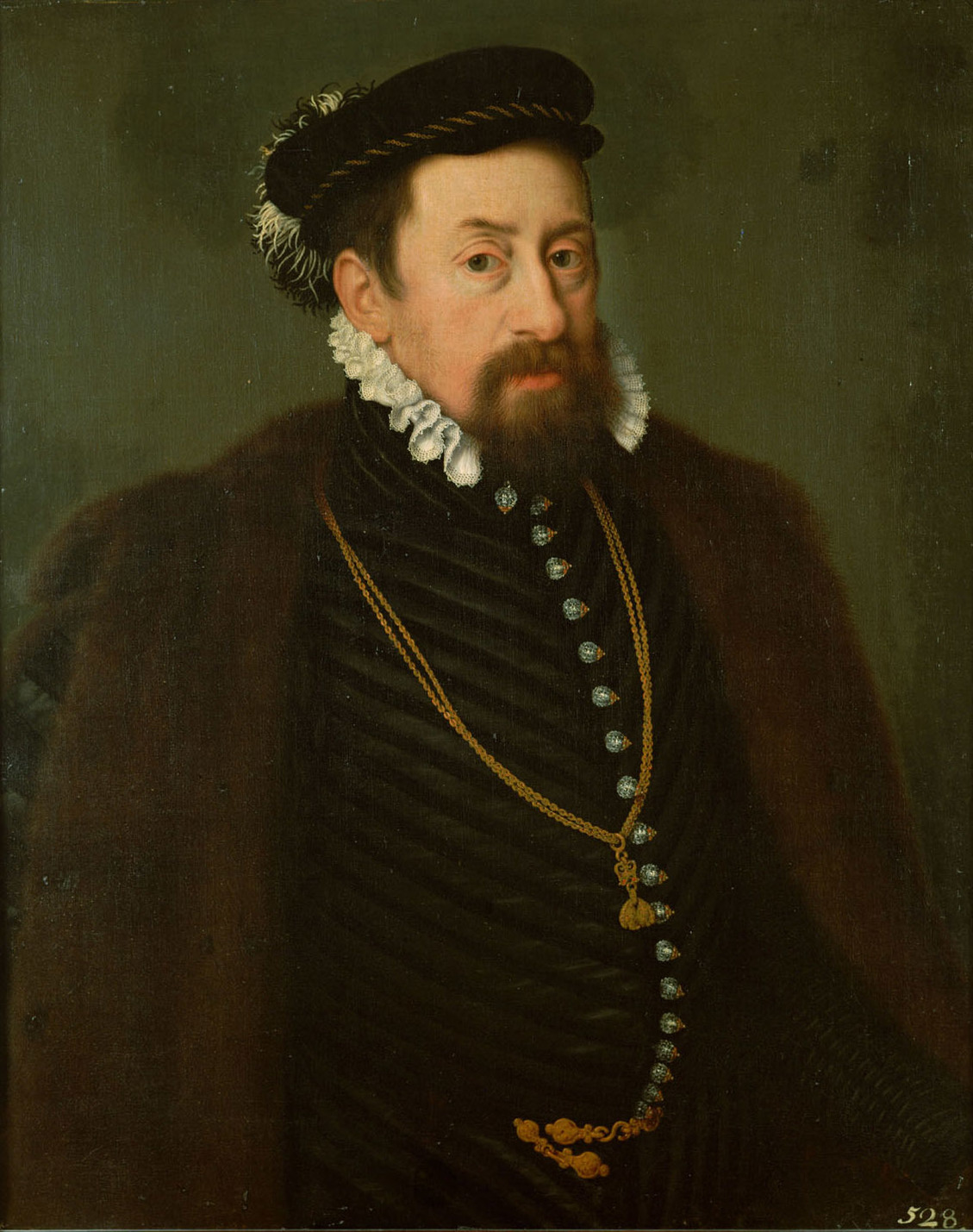 Maximilian II.